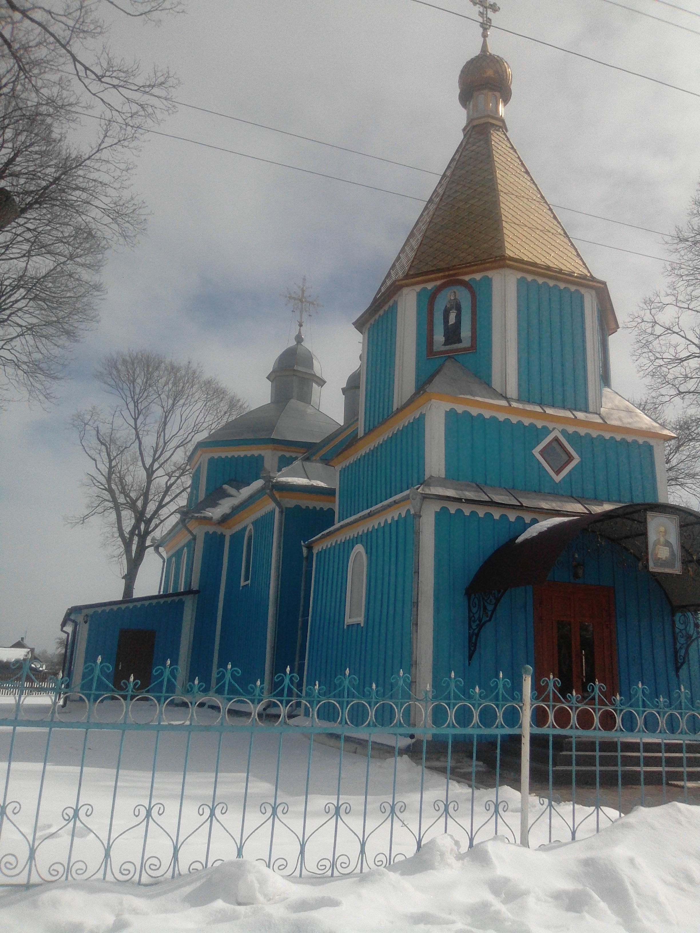 Храм Іоанна Богослова